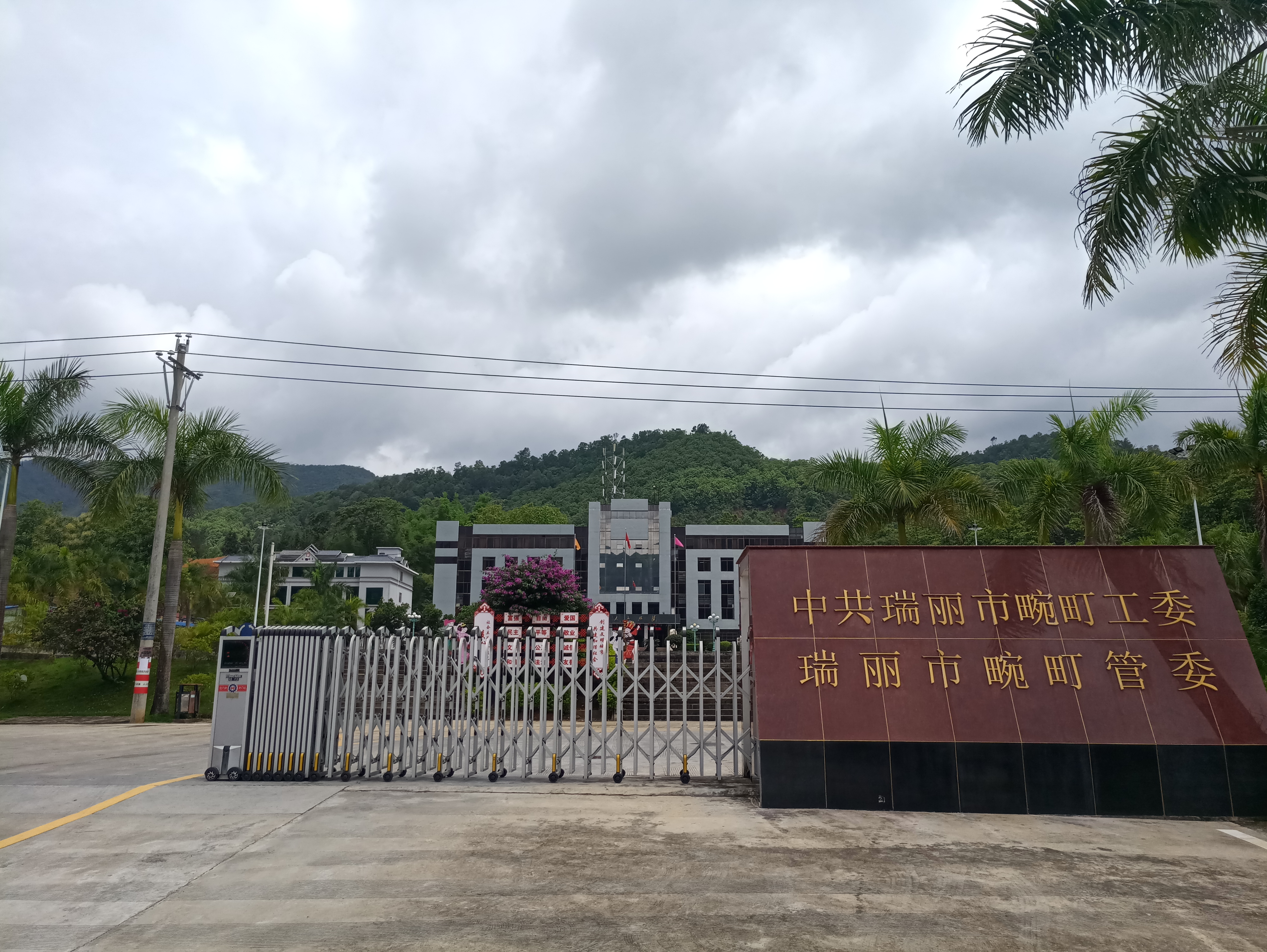 中文（中国大陆）: 畹町开发区管委会大门